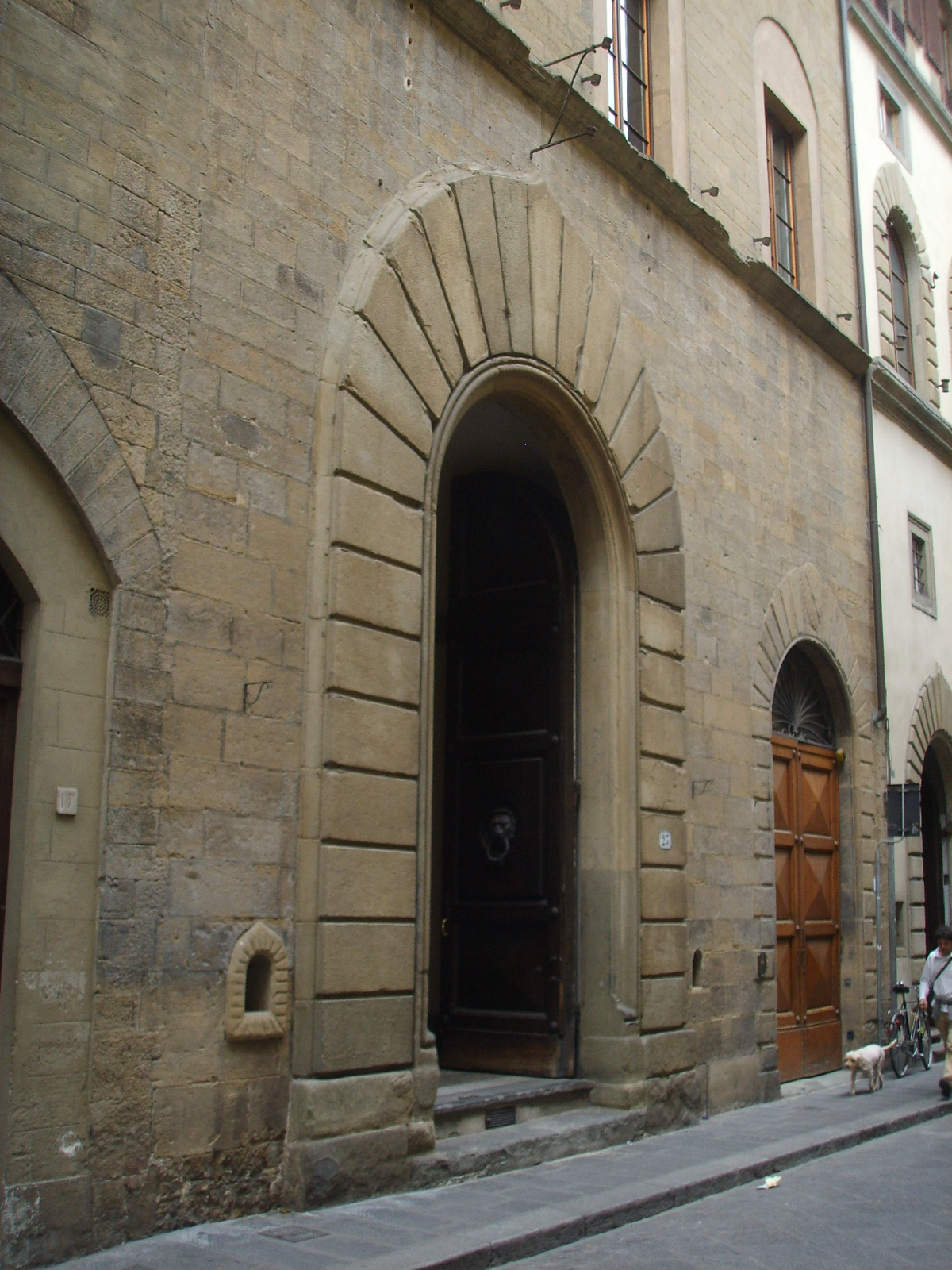 Palazzo manetti portale